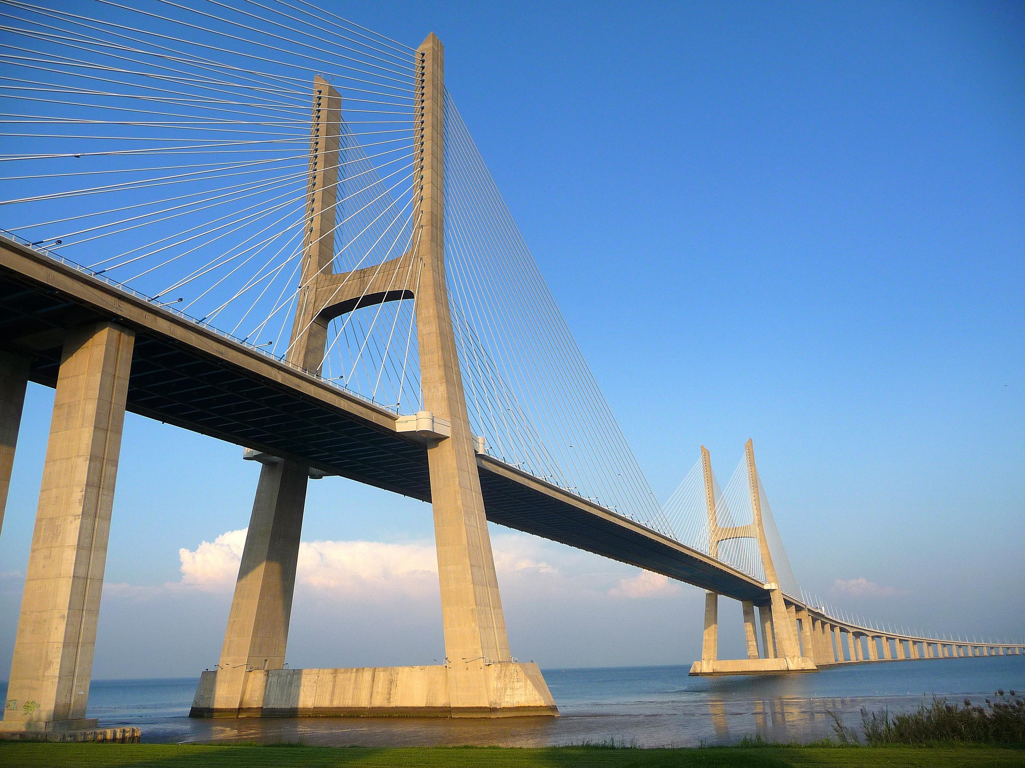 Ponte Vasco da Gama, Lisboa | Vasco da Gama Bridge, Lisboa 0507